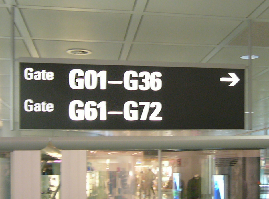 Anzeigetafeln im Terminal 2 des Flughafen Münchens